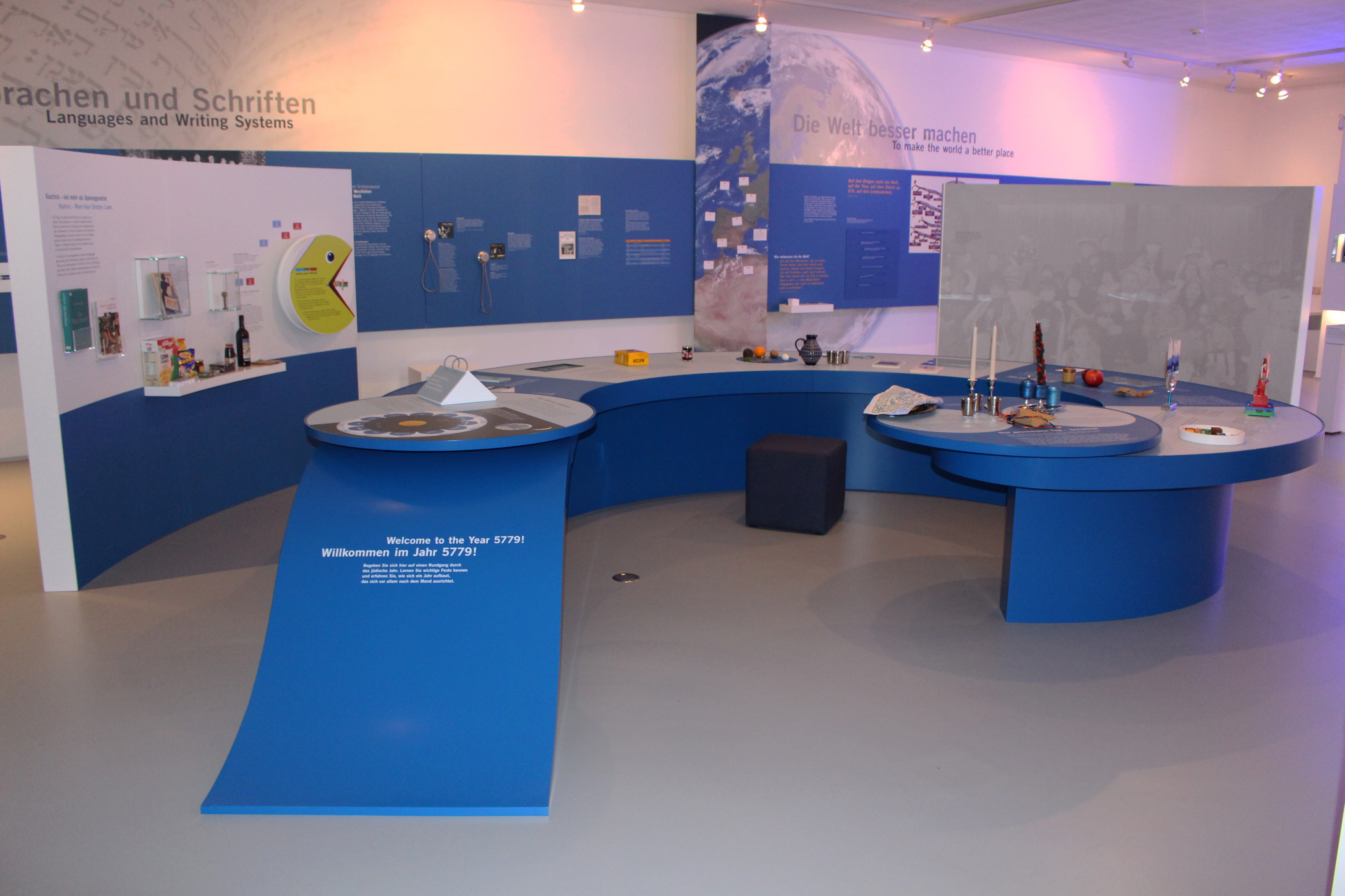 Ausstellungsteil "jüdische Feste"